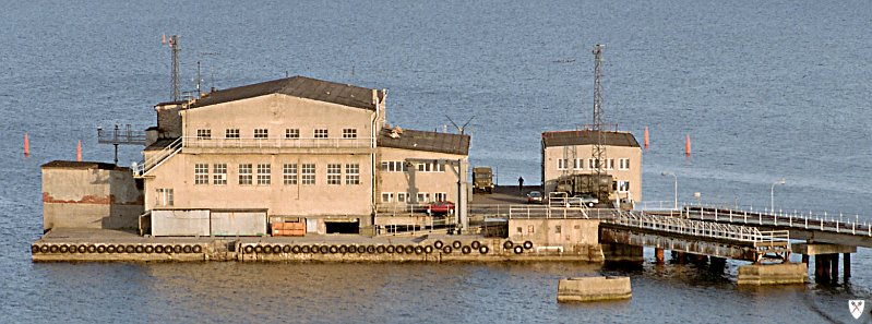 Formoza